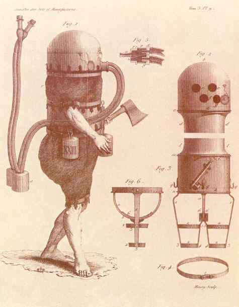 Einer der frühesten funktionstüchtigen Taucheranzüge des deutschen Erfinders Karl Heinrich Klingert (1760–1828)